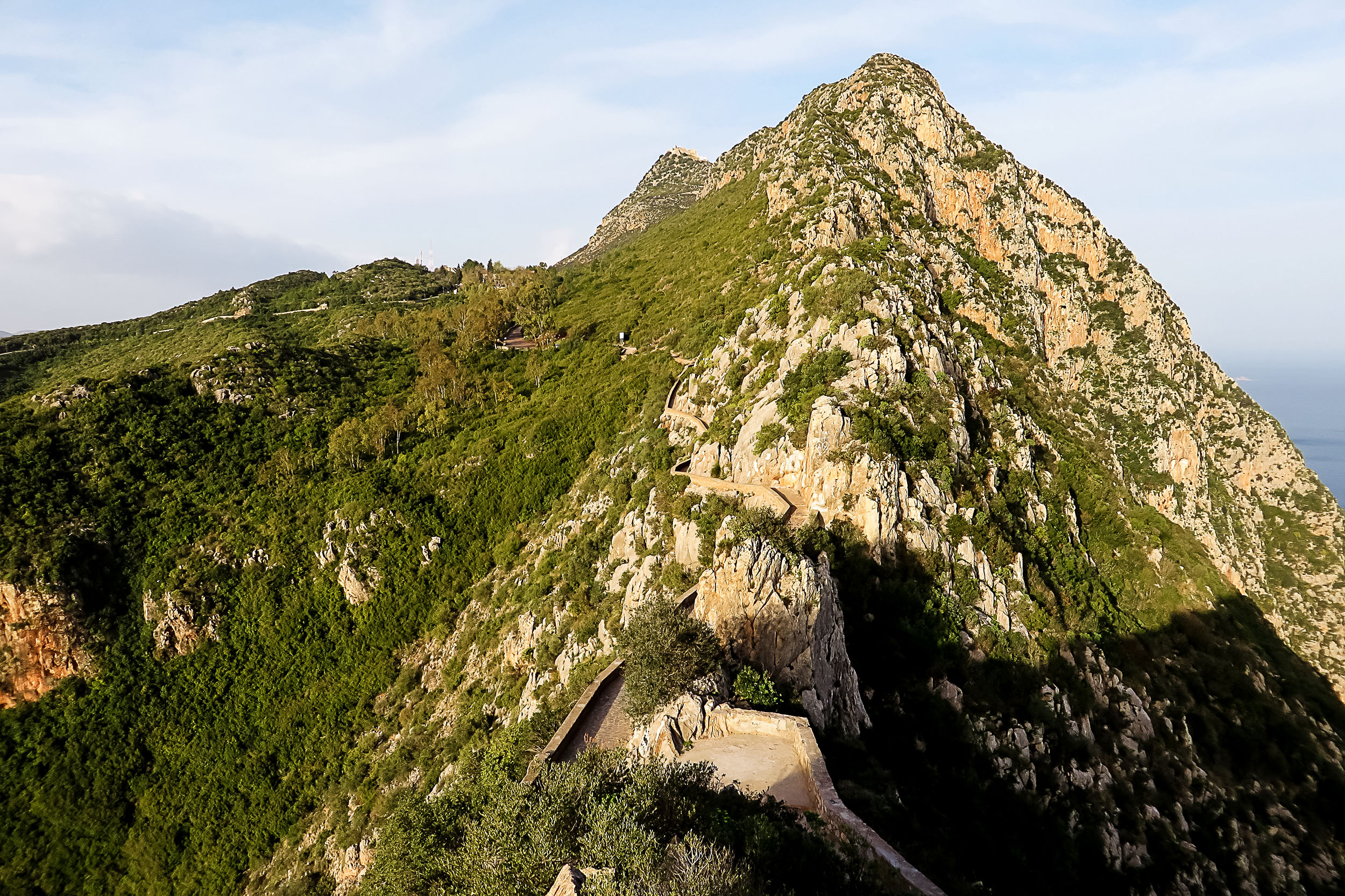 Le pic des singes - parc national de Gouraya, wilaya de Béjaia - Algérie قممة القردة بالحظيرة الوطنية قوراية - ولاية بجاية - الجزائر